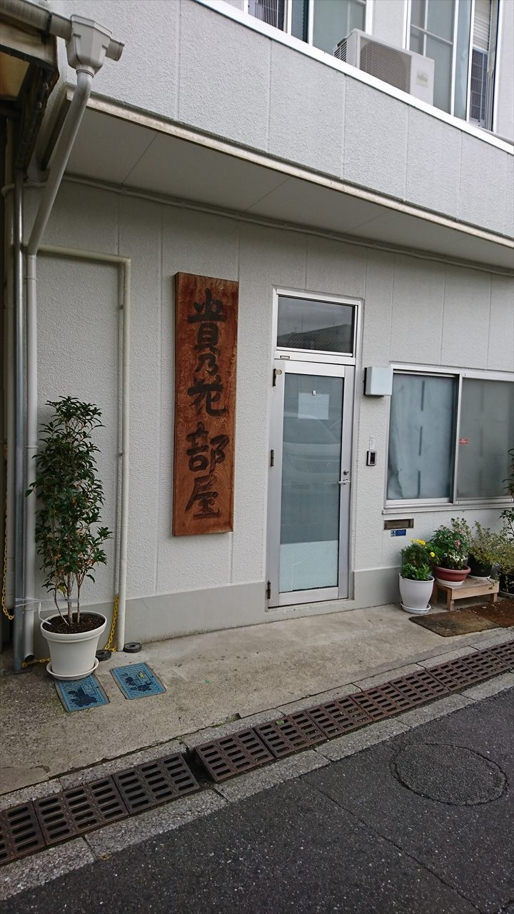 東京都江東区東砂にあった大相撲 貴乃花部屋(2018年10月閉鎖)の正面玄関